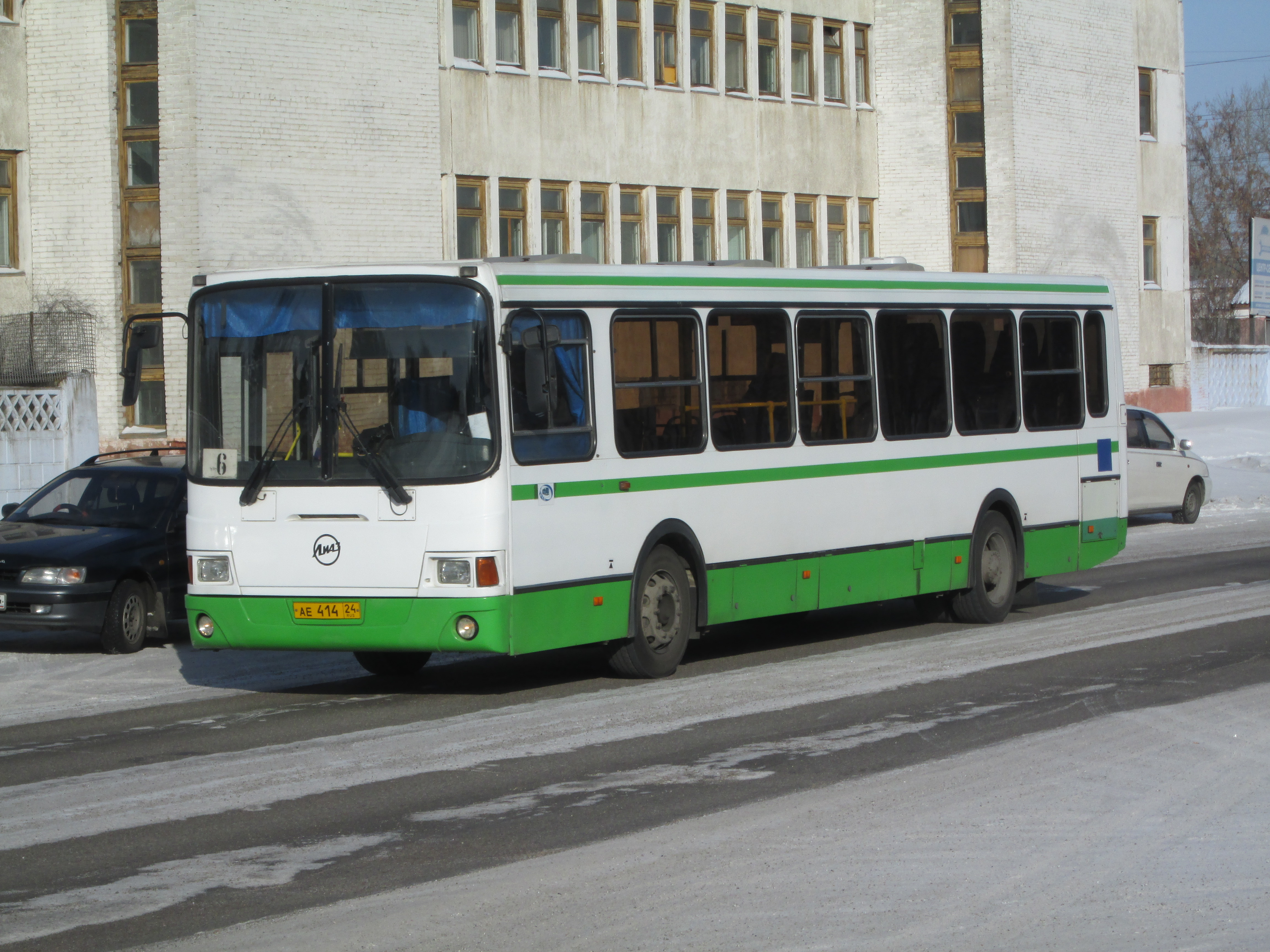 Один из 2 Лиазов 5256 в Железногорске